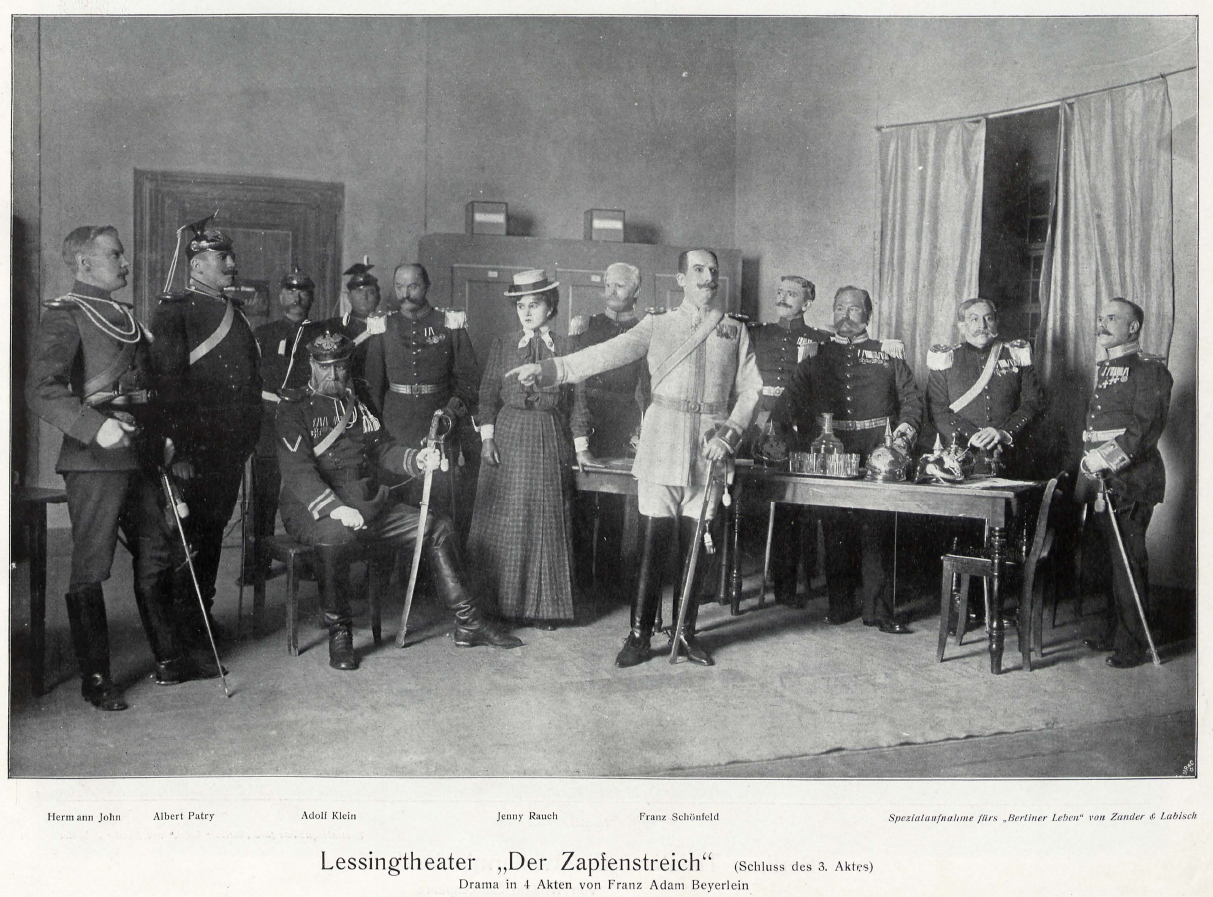 Szenenbild aus dem Drama "Der Zapfenstreich" von Franz Adam Beyerlein aus der Aufführunge im Berliner Lessing-Theater, 1903.